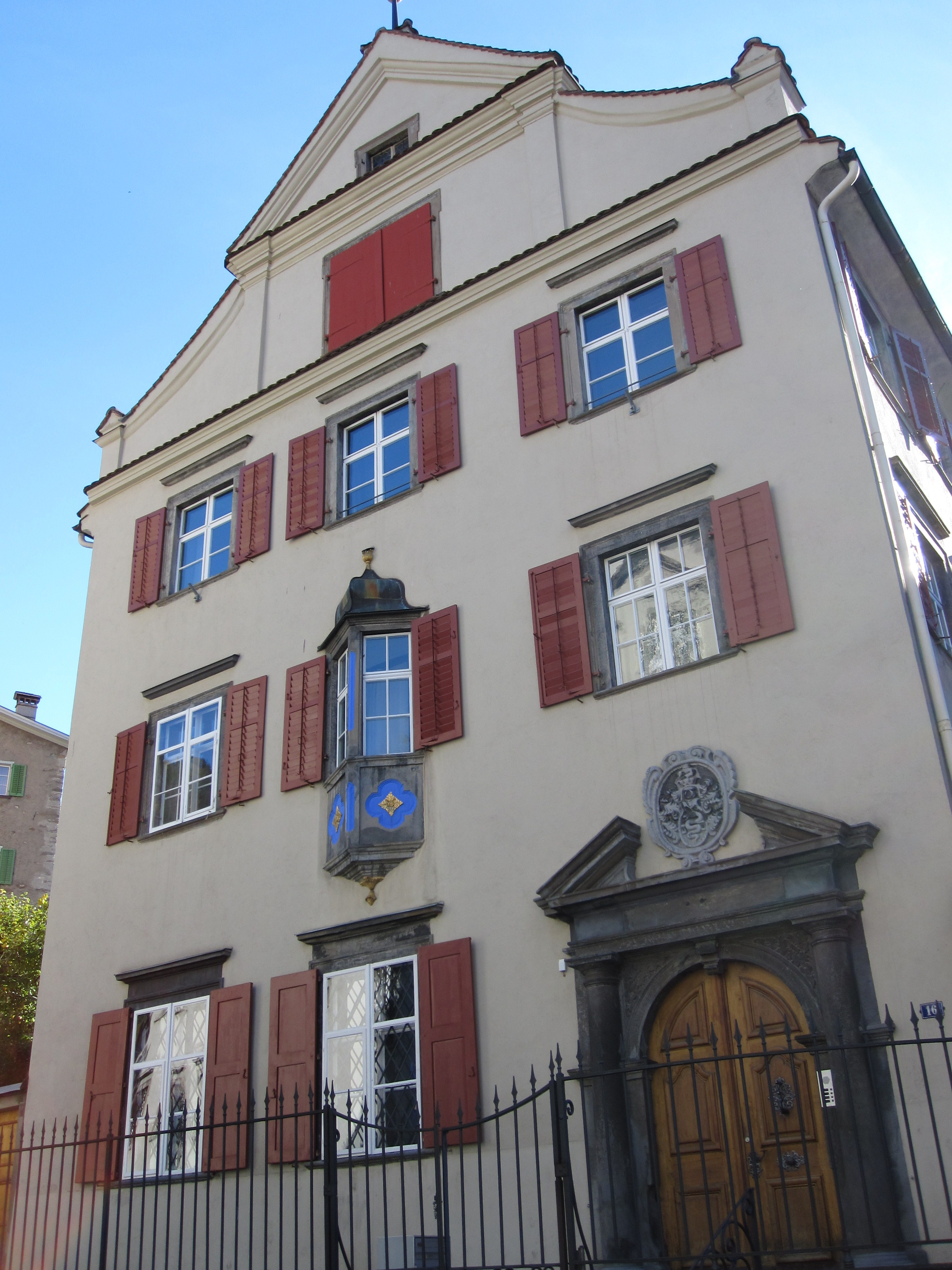 Oberer Spaniöl in Chur (Kanton Graubünden, Schweiz)